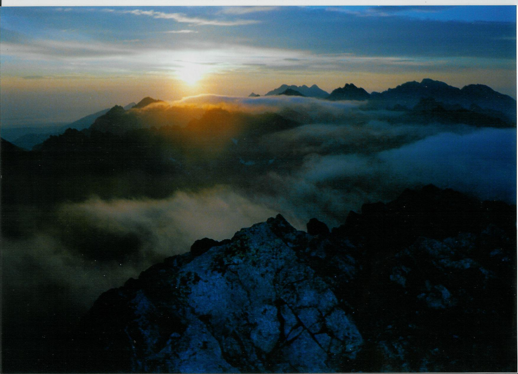 pohlad z Krivana 5:00 Licensing